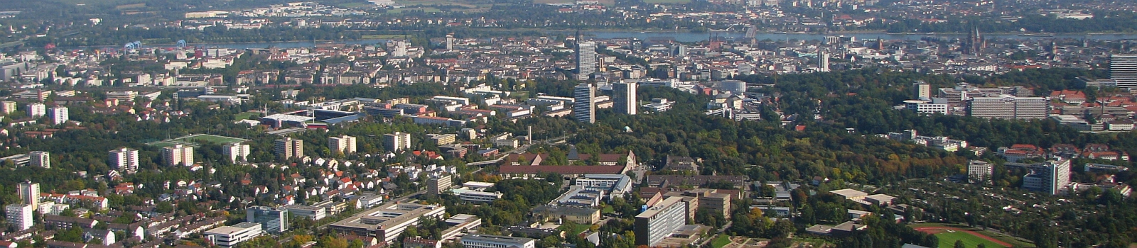 Mainz Luftbild Panorama der modernen Landeshaupt- und Universitätsstadt Mainz Foto 2008 Wolfgang Pehlemann Wiesbaden IMG_0063